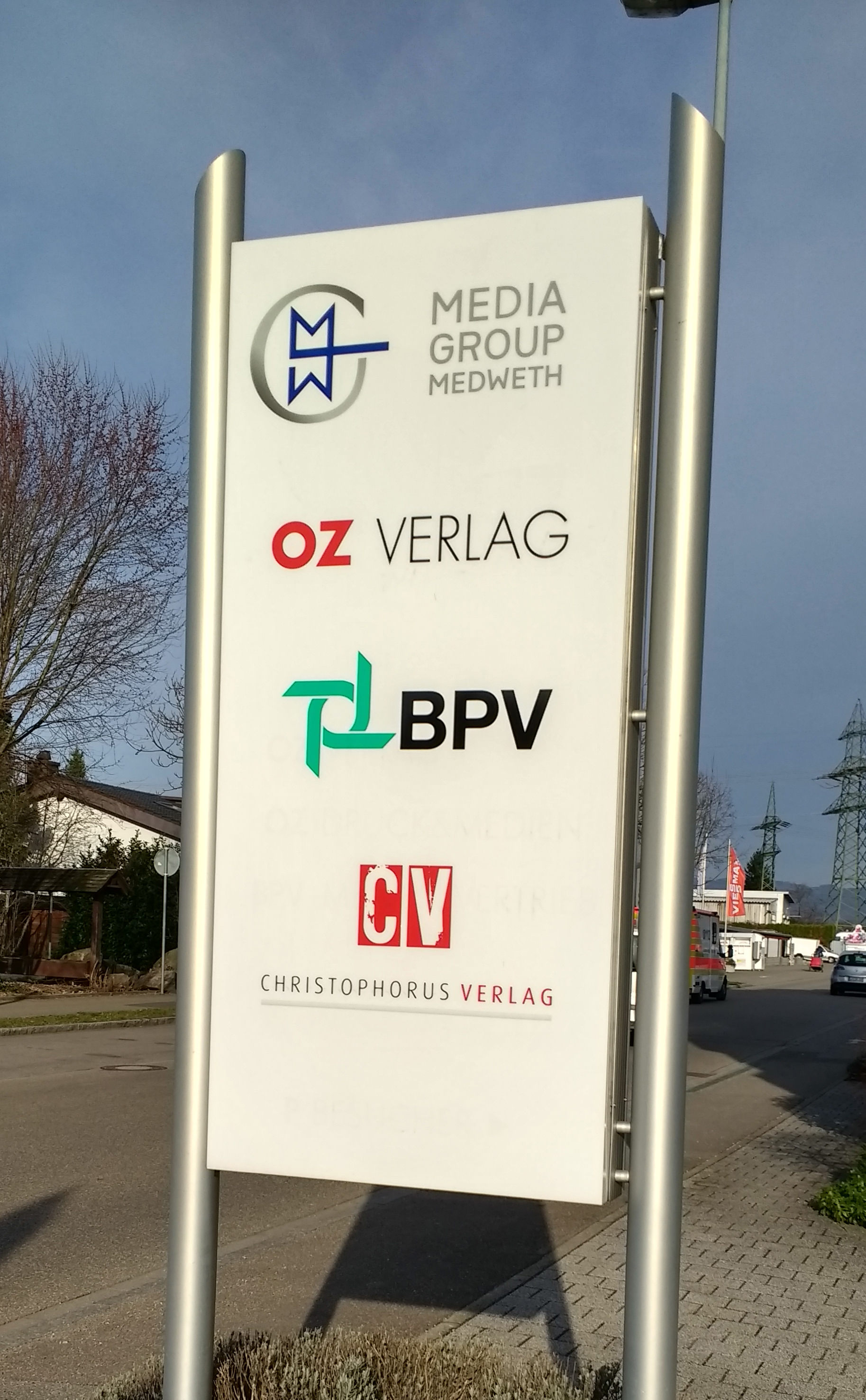 Firmenlogos der Unternehmensgruppe vor der Zentrale in Rheinfelden (Baden), Deutschland